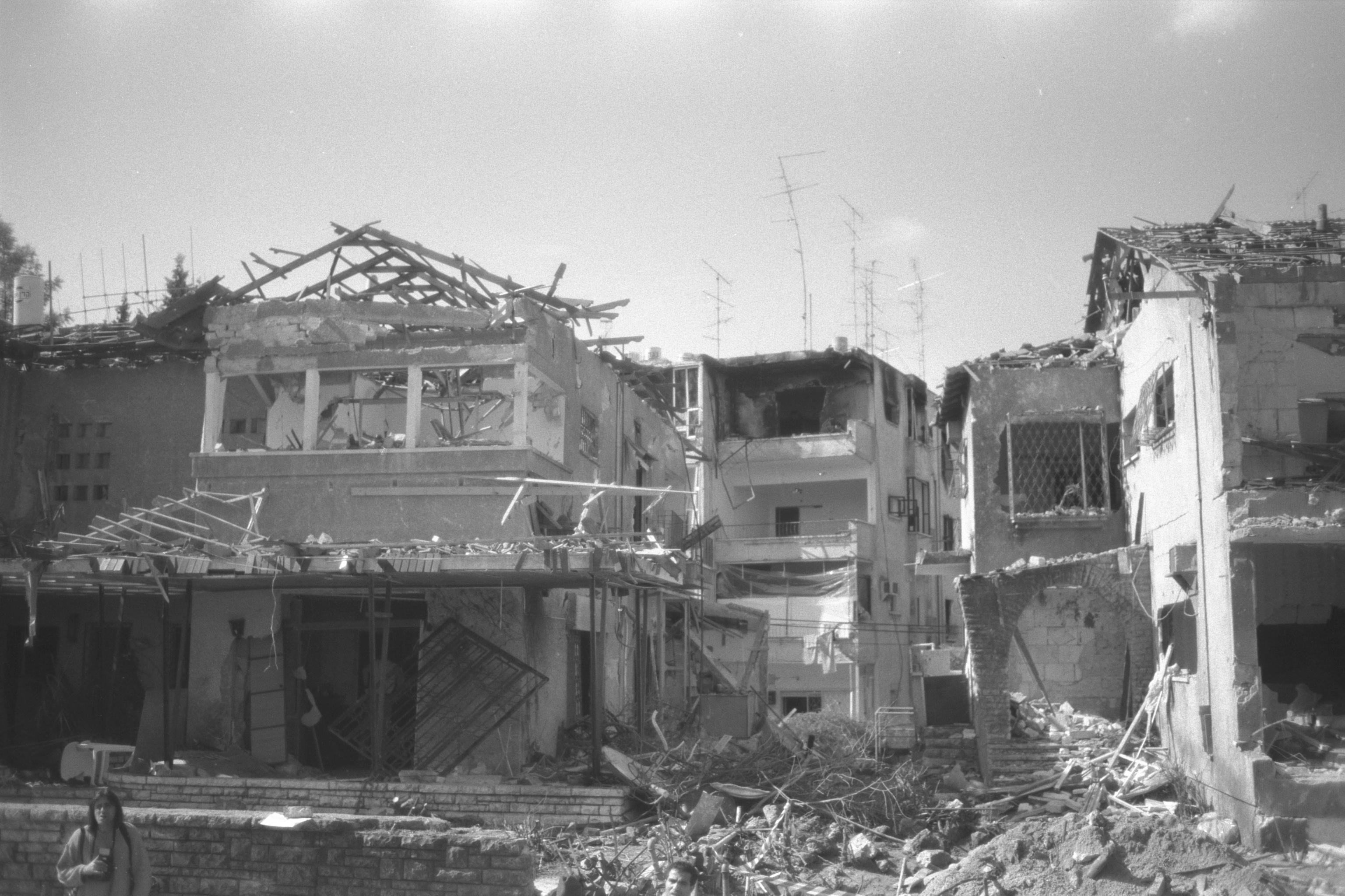 Ramat Gan Yona street, Ramat Gan home hit by an Iraqi Scud missile. מלחמת המפרץ. בצילום, בתי המגורים ברחוב יונה ברמת גן שניזוקו מנפילת טיל סקאד ששוגר מעיראק.